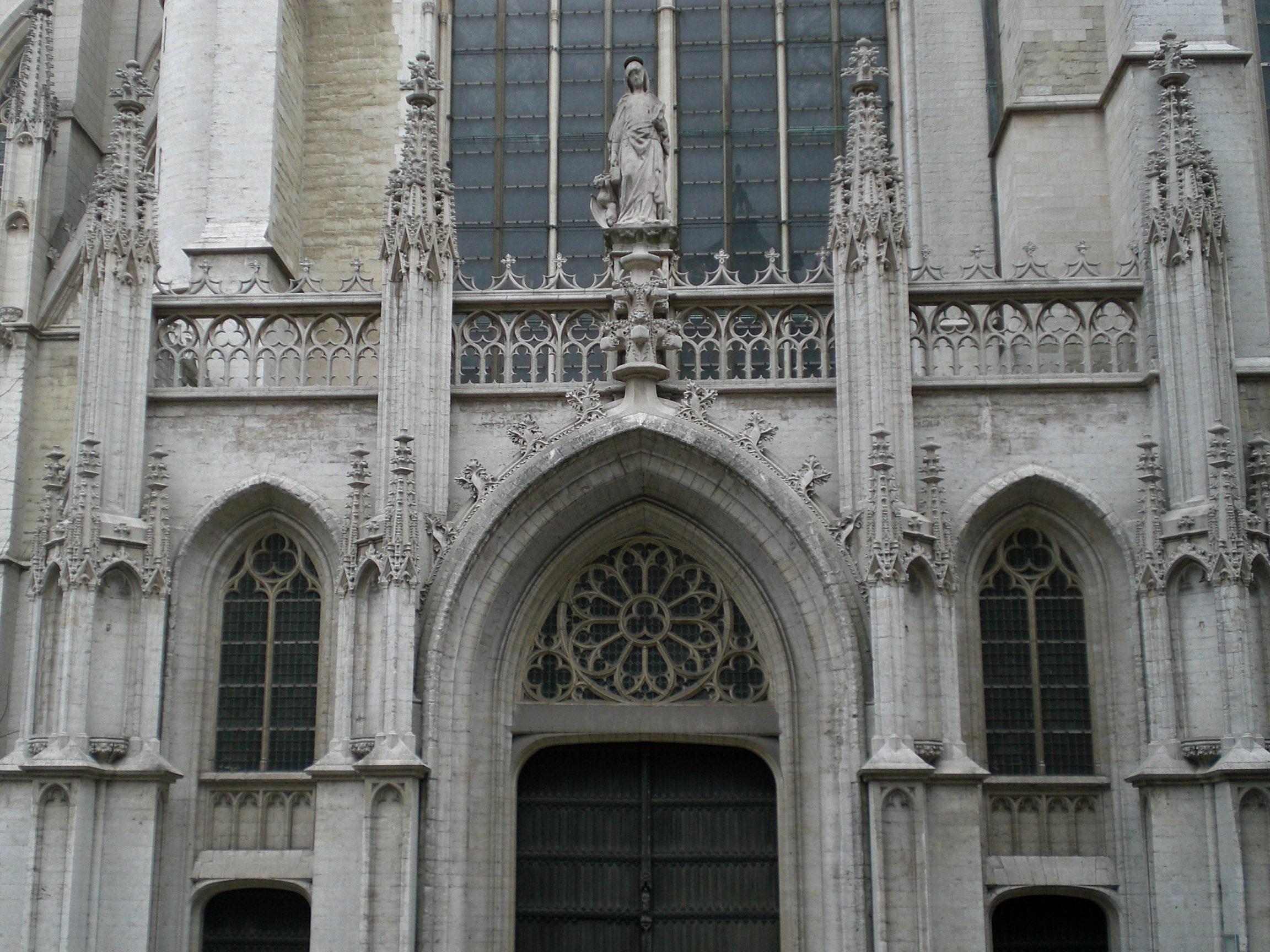 Cathédrale Saints-Michel-et-Gudule de Bruxelles vue de côté pour voir les détails de la porte.